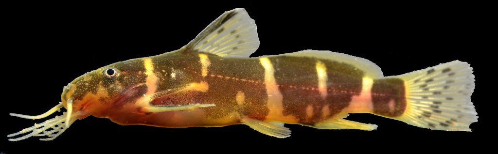 Microsynodontis